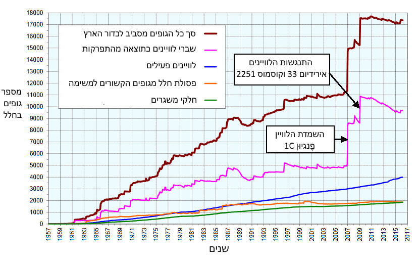 תרשים המתאר את מספרי פסולת החלל המקיפה את כדור-הארץ לפי שנים. תרגום מצרפתית.